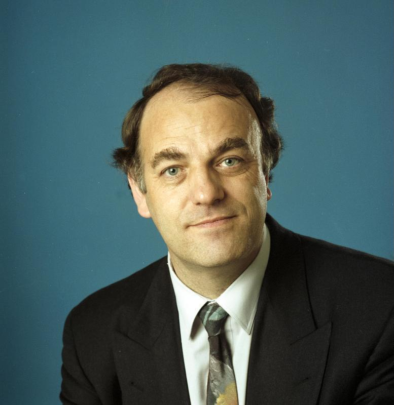 22.4.1991 Wolfgang Rauls, F.D.P. Minister für Umwelt und Naturschutz des Landes Sachsen-Anhalt